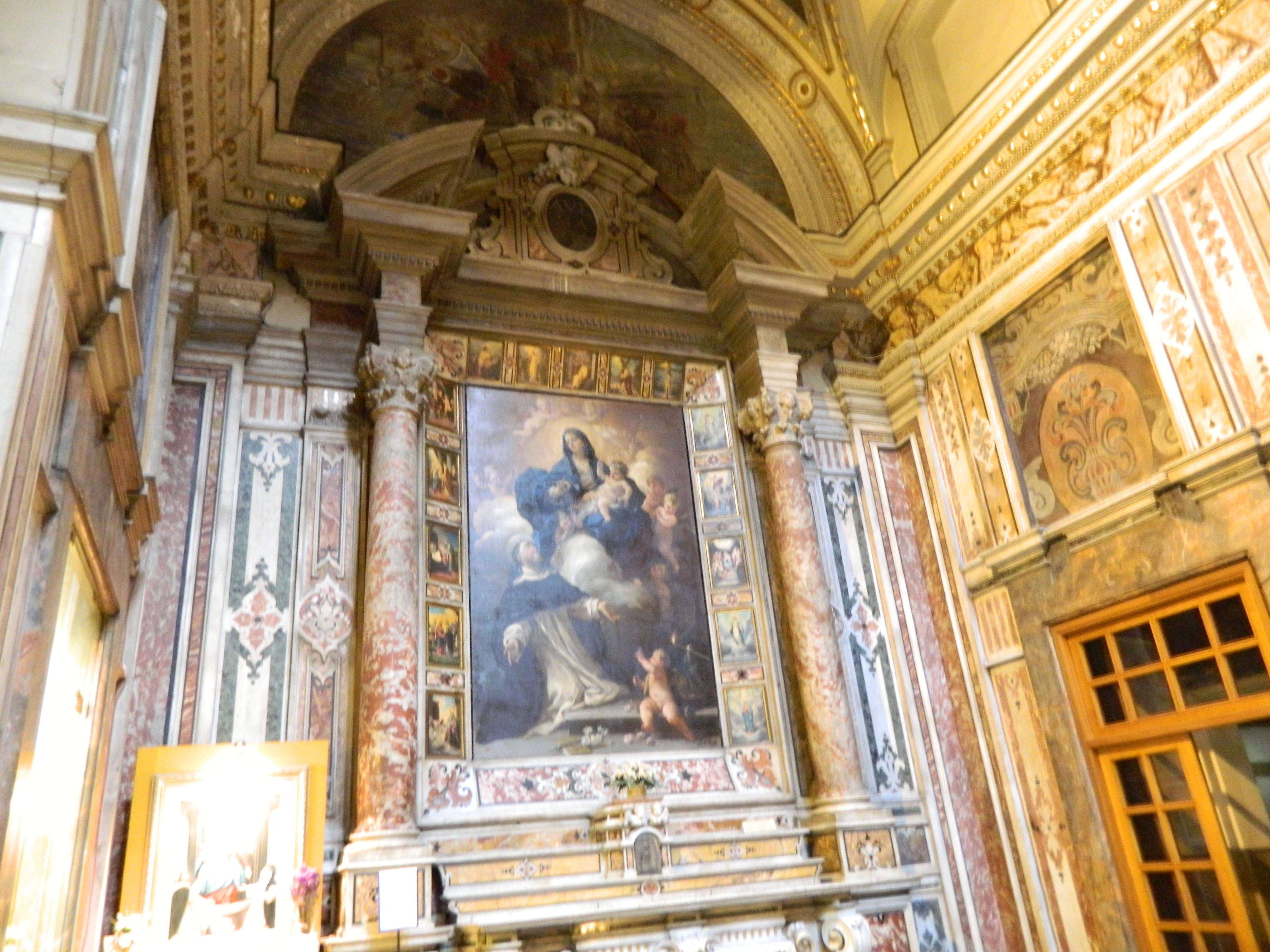 Chiesa di San Domenico Soriano (Napoli) - Transetto sinistro, tela di Luca Giordano raffigurante la Madonna del Rosario (1690)